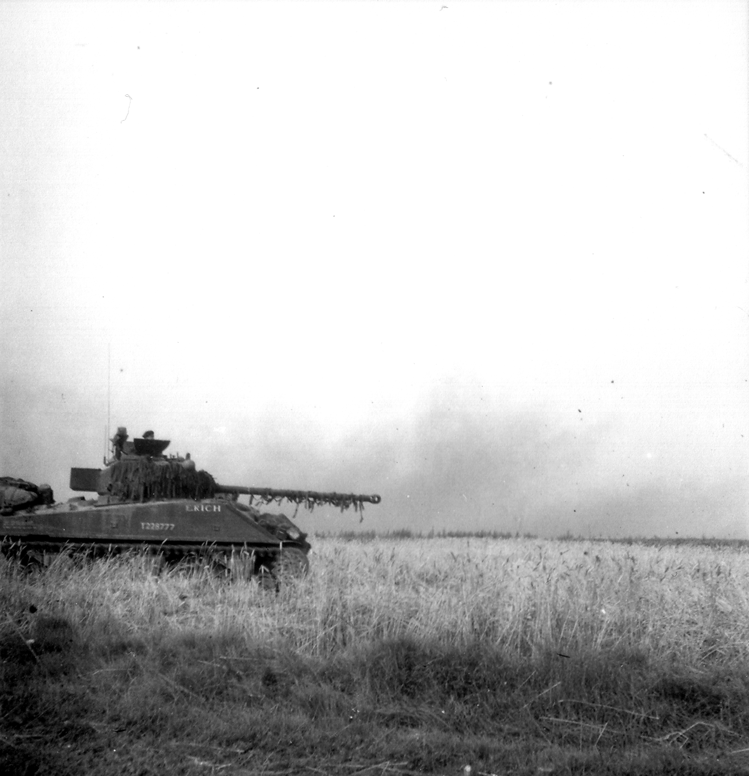 Un char d'un régiment de blindés canadiens monte sur une butte.